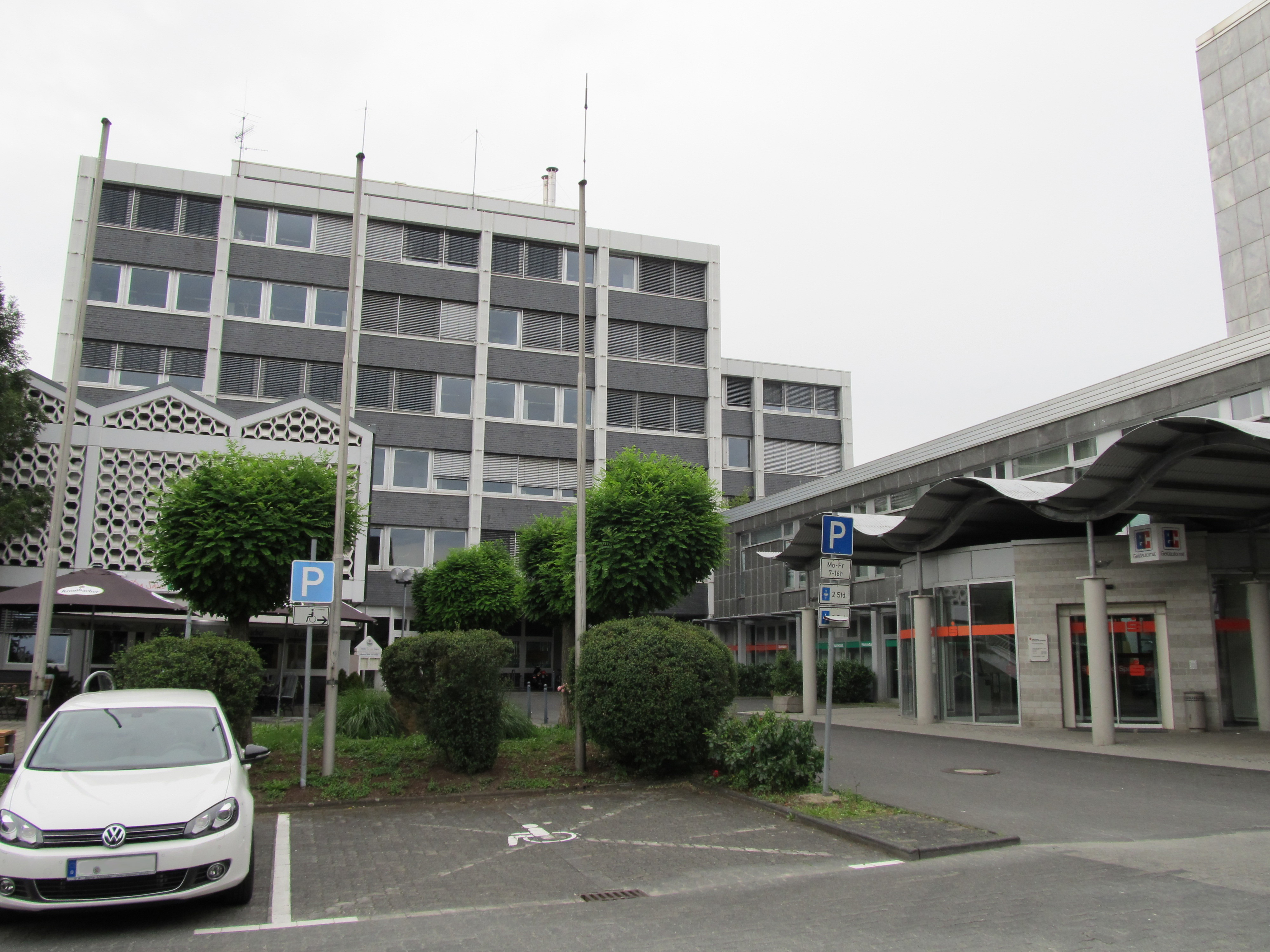 Das Rathaus in Neunkirchen, Siegerland.